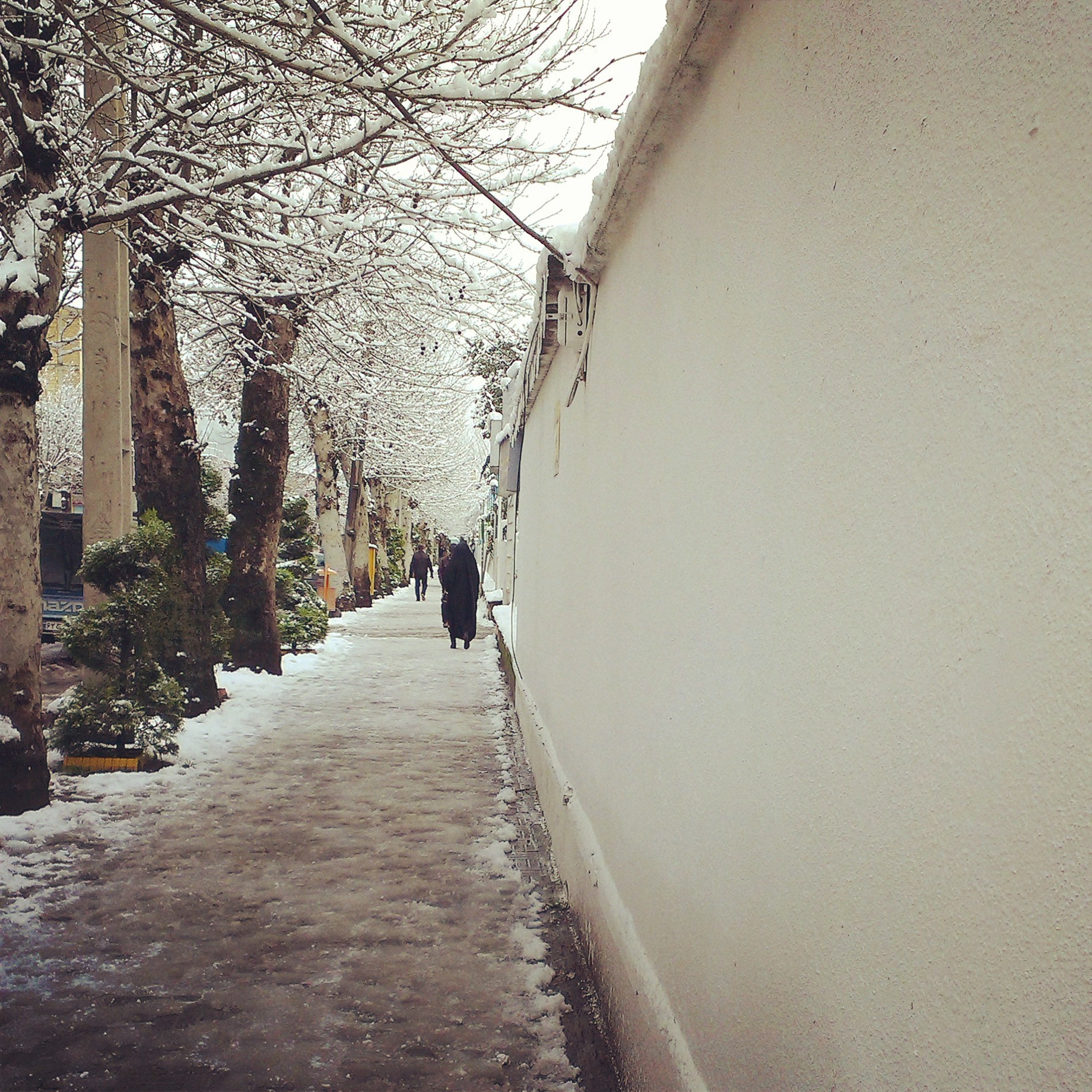 Langroud snow 92